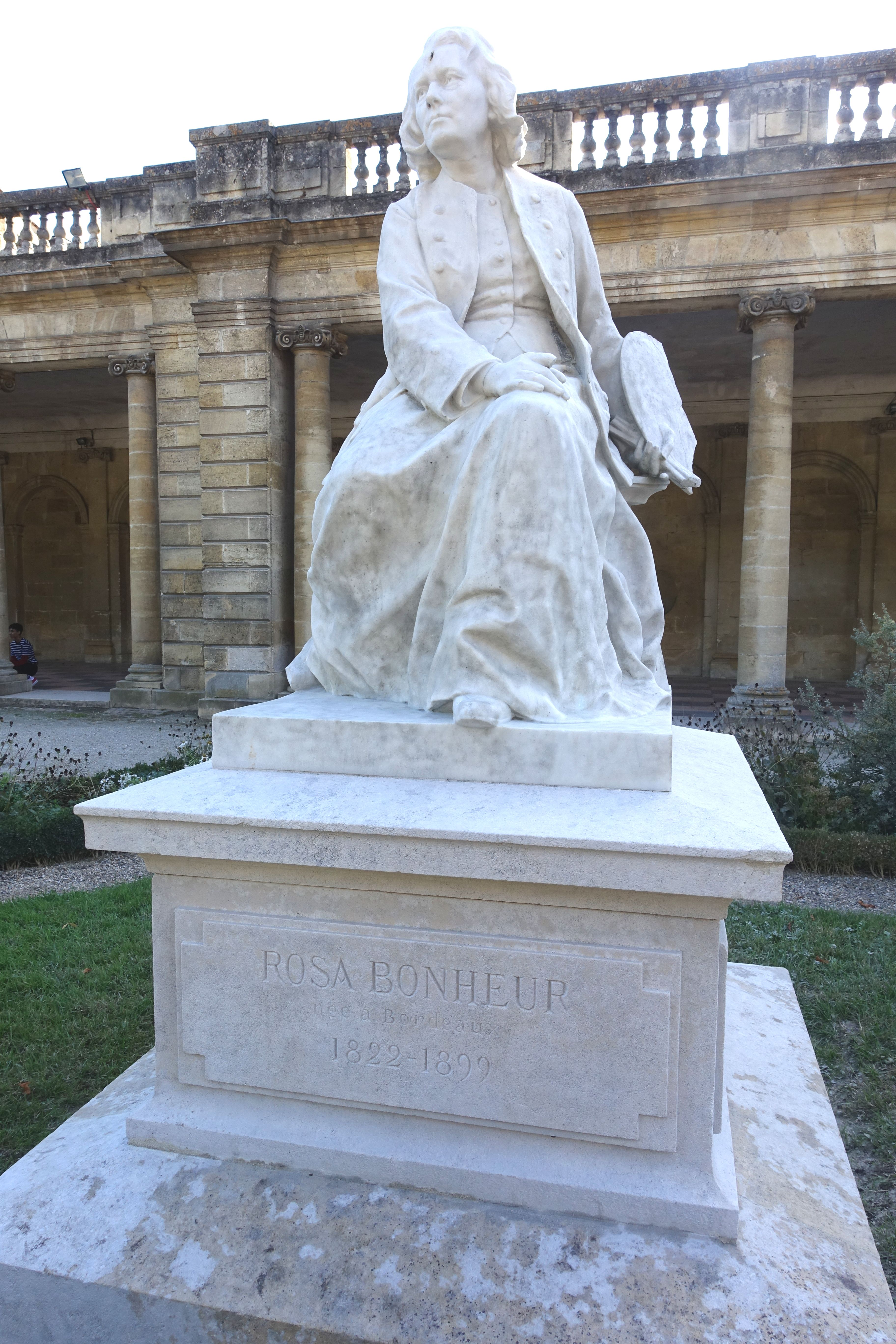 Terrasse du Jardin public de Bordeaux ; sculpture de Gaston Leroux, marbre 1910 d'après plâtre 1902